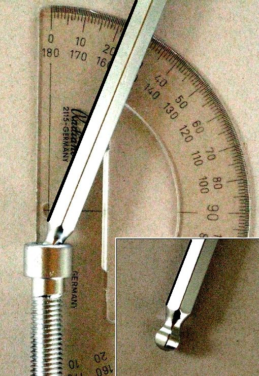 Inbus-Schlüssel mit Kugel-Kopf: schräg in Inbusschraube steckend